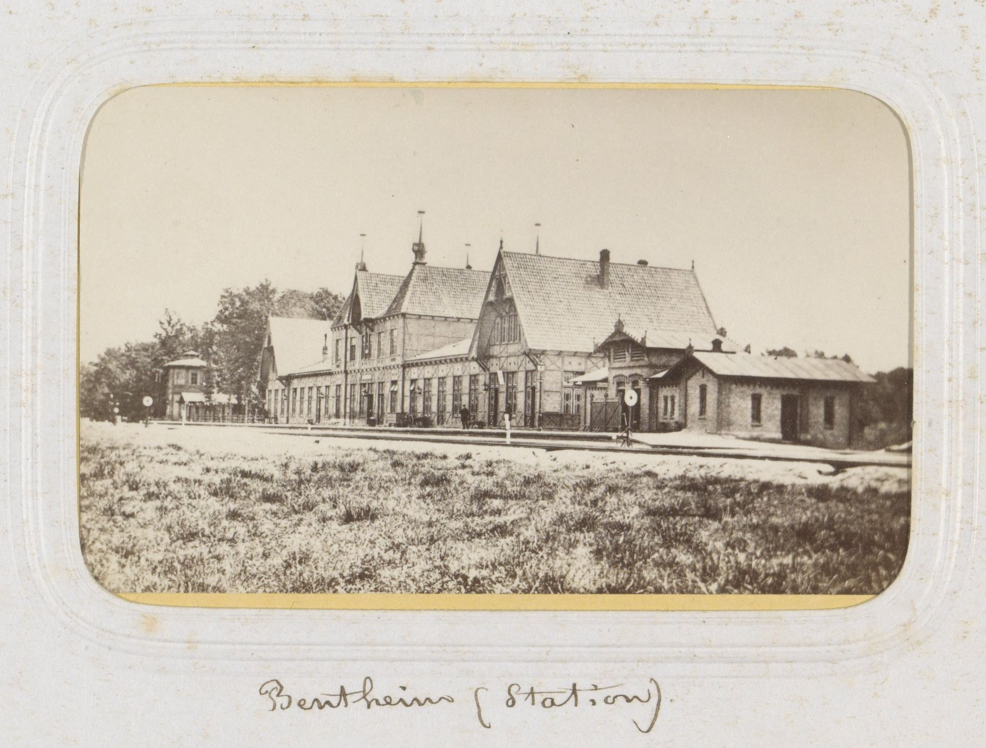 IdentificatieTitel(s): Gezicht op het spoorwegstation van BentheimObjecttype: foto carte-de-visite albumblad Objectnummer: RP-F-F00861-25-2Omschrijving: Onderdeel van Reisalbum met foto's van beziensWaar: digheden in Zwitserland.VervaardigingVervaardiger: fotograaf: anoniemPlaats vervaardiging: BentheimDatering: ca. 1871Fysieke kenmerken: albuminedrukMateriaal: karton papier fotopapier Techniek: albuminedrukAfmetingen: passe-partout: h 55 mm × b 89 mmOnderwerpWat: station; shelter (railway, tramway)railway, trainWaarBentheimVerwerving en rechtenVerwerving: overdracht van beheer 1994Copyright: Publiek domein